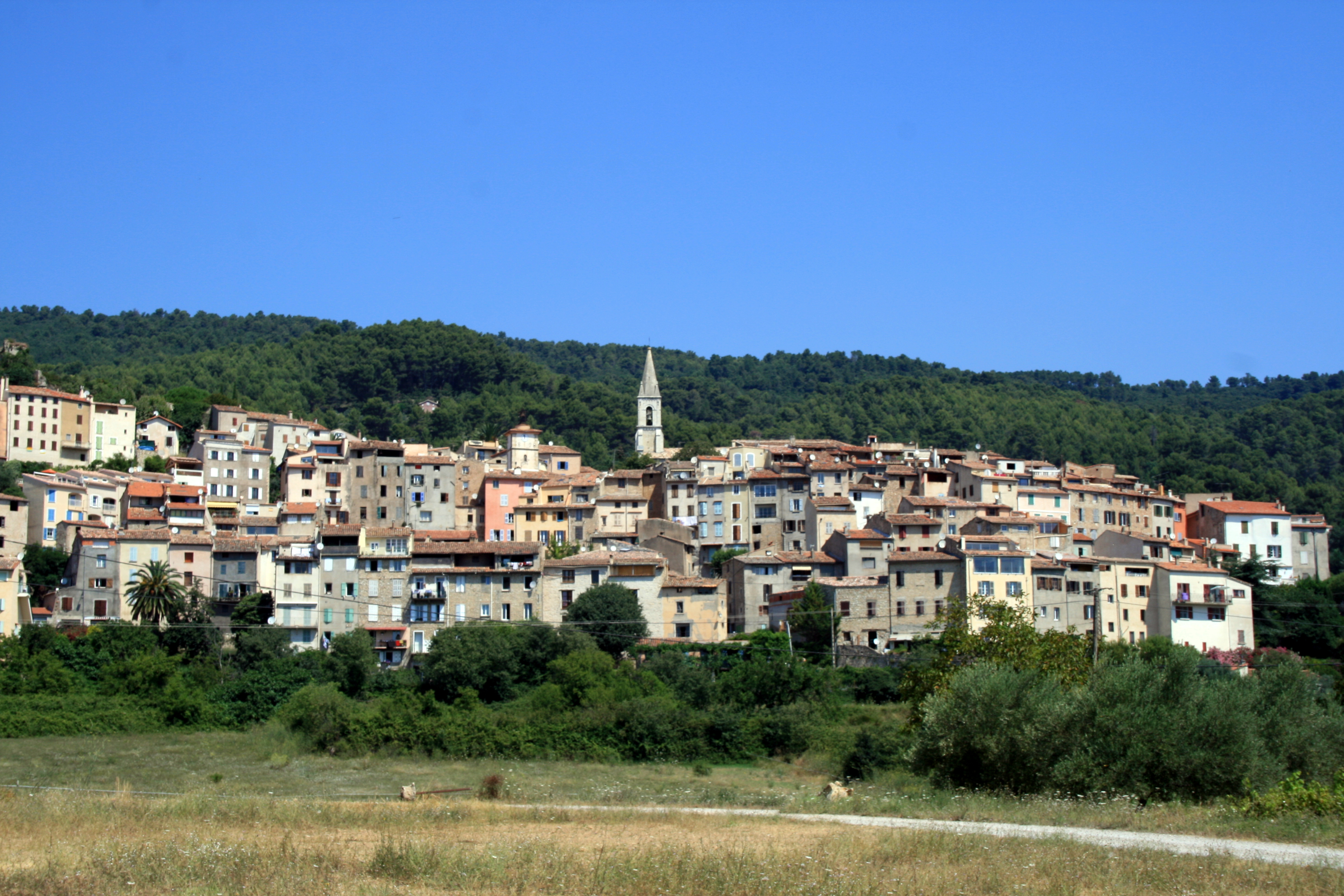 Vue générale du village de Callas